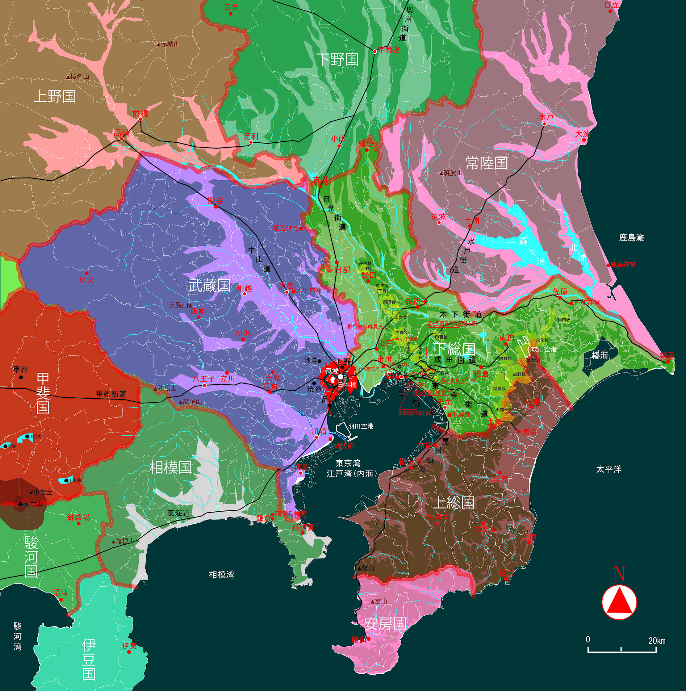 坂東（東国）地方の牧場と主な街道の分布を示したマップ